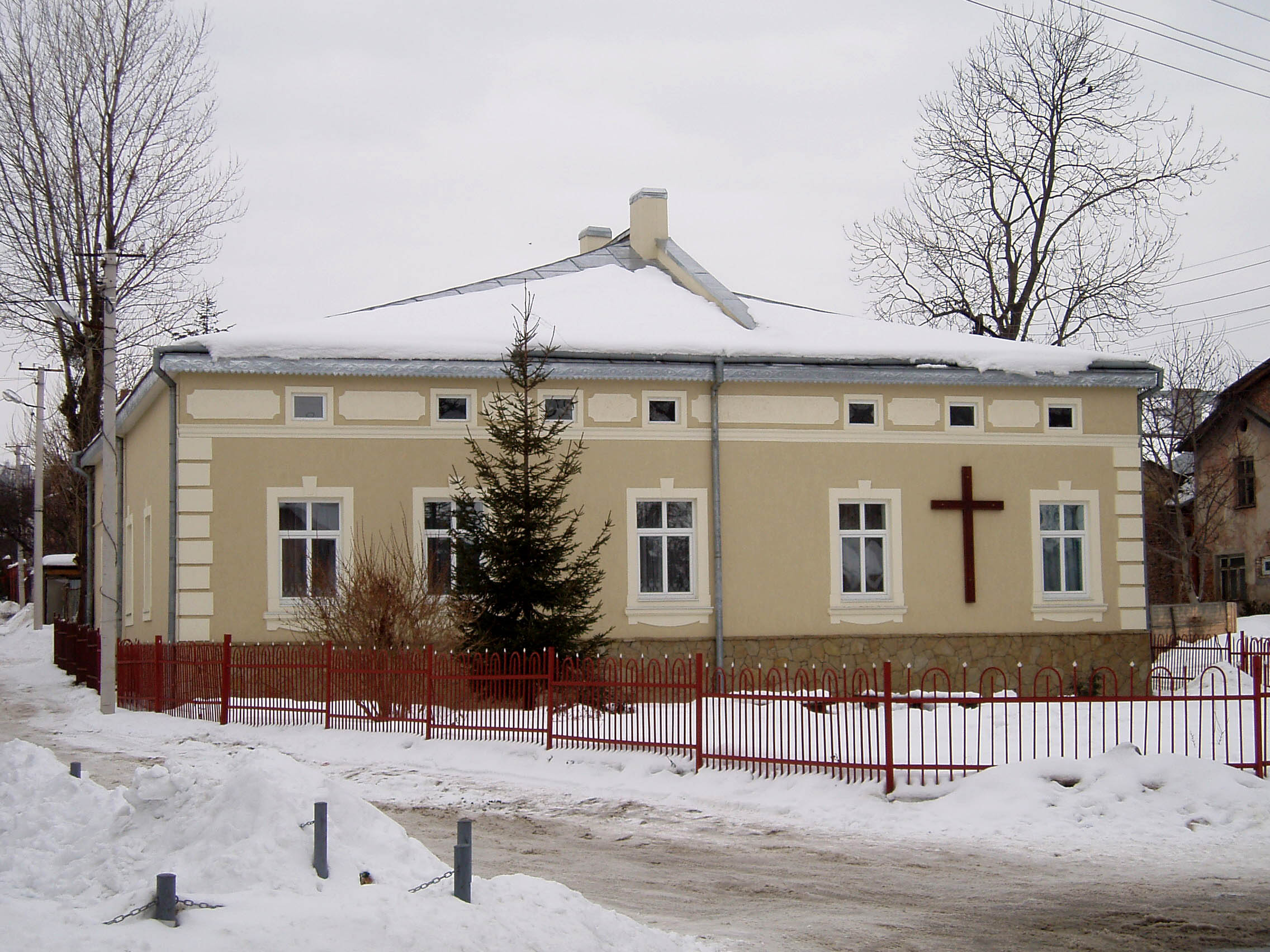 Будинок на вулиці Варшавській, 35 у Львові. Друга адреса - вулиця Алчевської, 2.